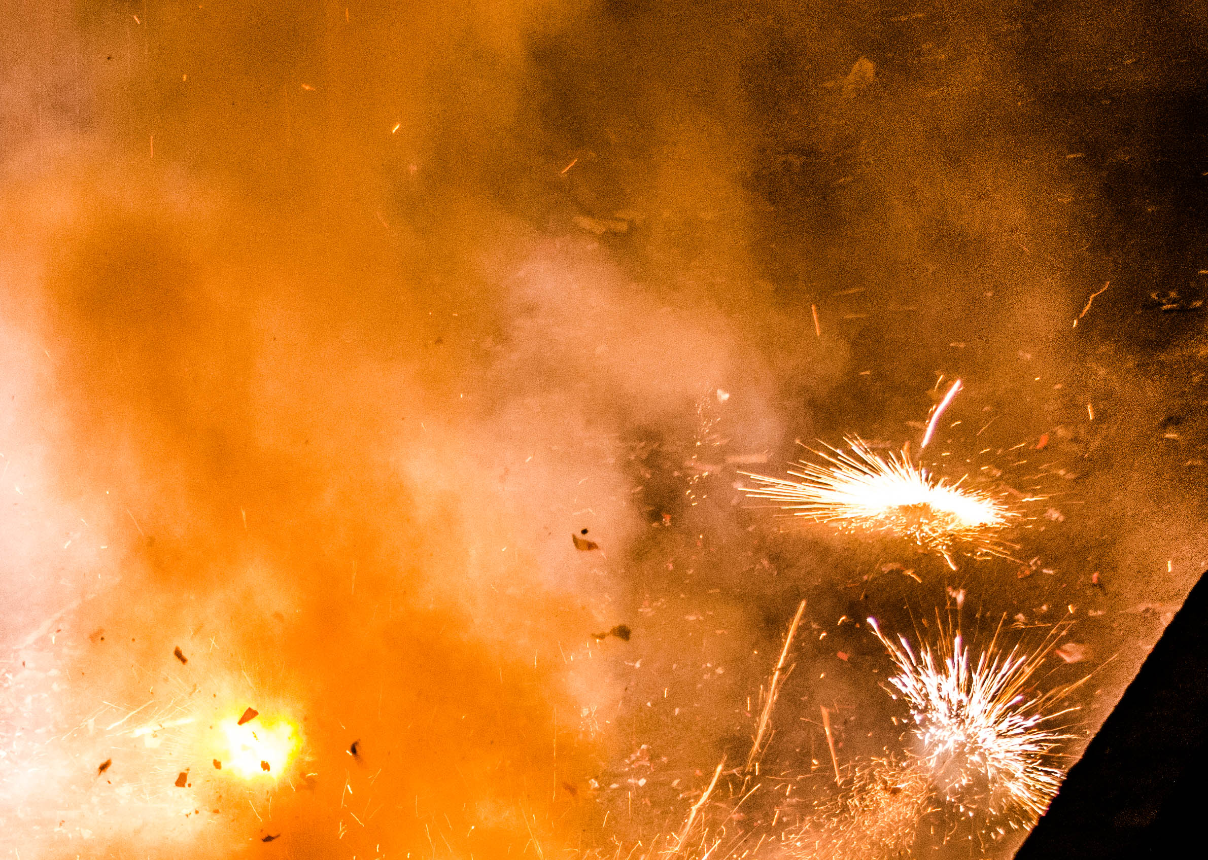 Fireworks and Diwali